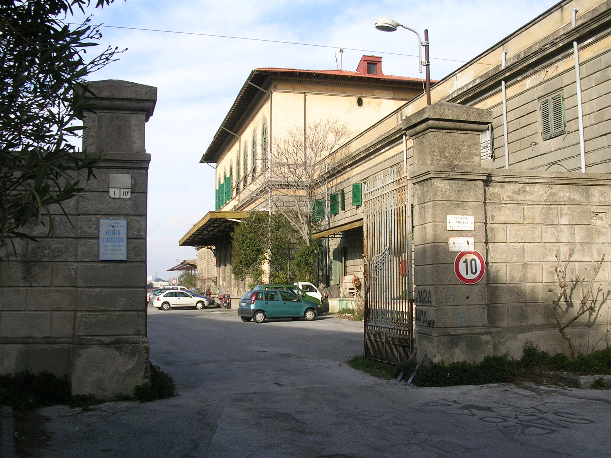 Livorno: la Stazione di Livorno San Marco (XIX secolo). Corpo principale, in degrado.